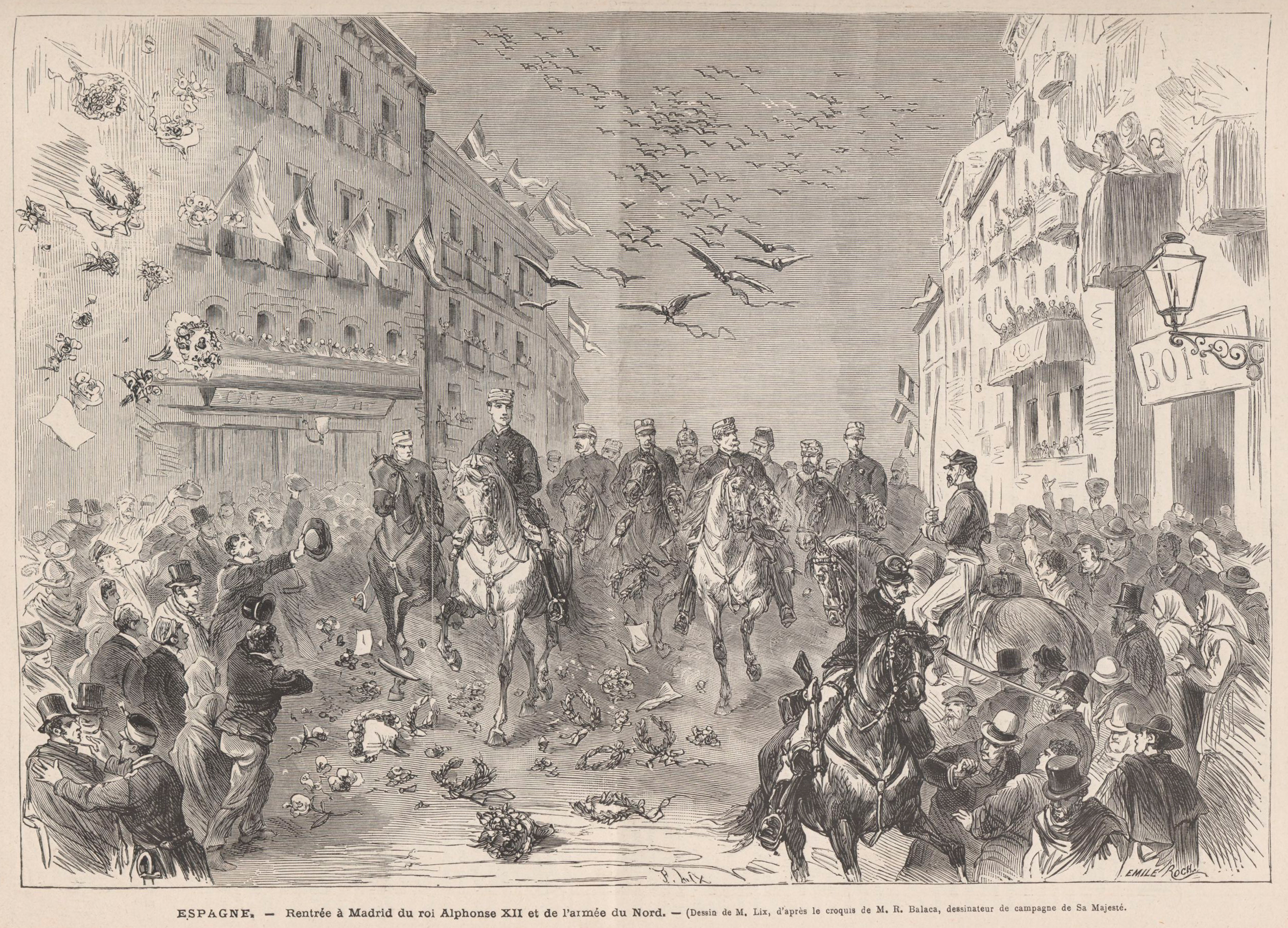 Espagne, rentrée à Madrid du roi Alphonse XII et de l'armée du Nord. — (Dessin de M. Lix, d'après le croquis de M. R. Balaca, dessinateur de campagne de Sa Majesté).